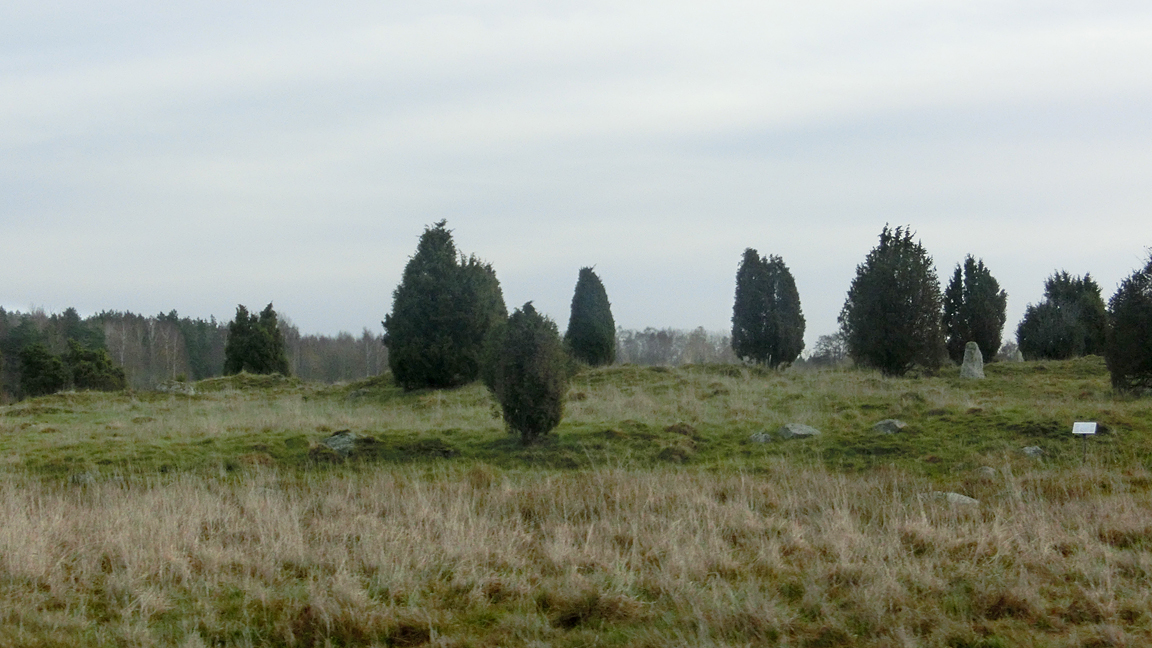 Gravfält (RAÄ-nr Väring 1:1) utmed Länsväg 200 vid Östergården, Lilla Väring, Värings socken, Skövde kommun, Vadsbo härad, f.d. Skaraborgs län, Västergötland, Västra Götalands län, Sverige. Gravfältet är beväxt med enbuskar (Juniperus communis).